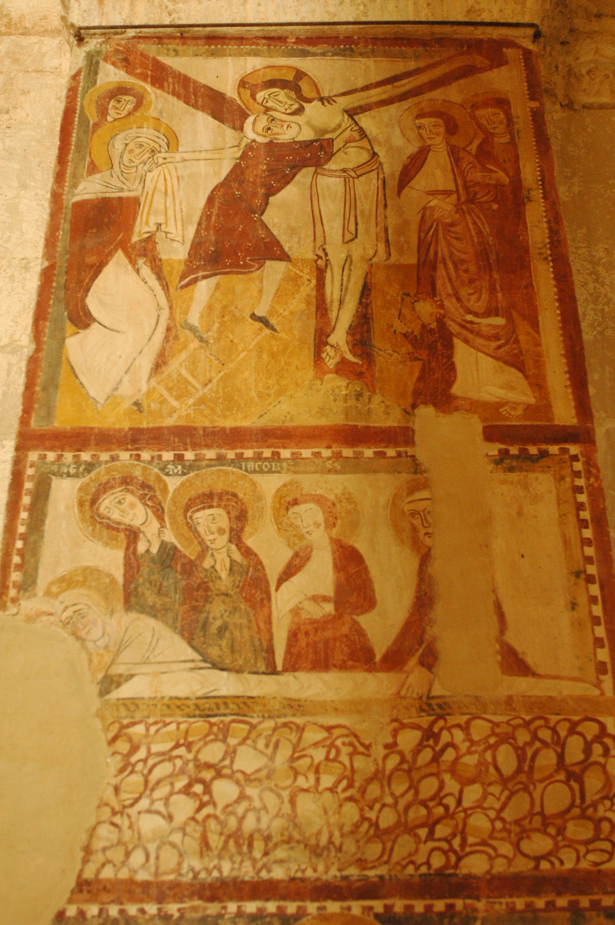 Affresco Deposizione, chiesa di San Tommaso Apostolo,Caramanico Terme (AQ)